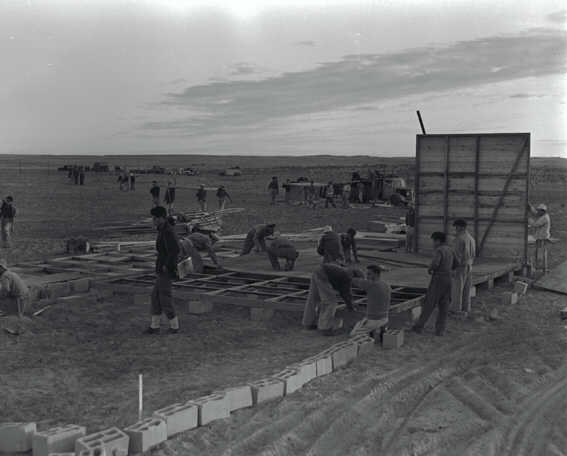 "חלוצה" - ישוב חדש בנגב- הקמת המחנה